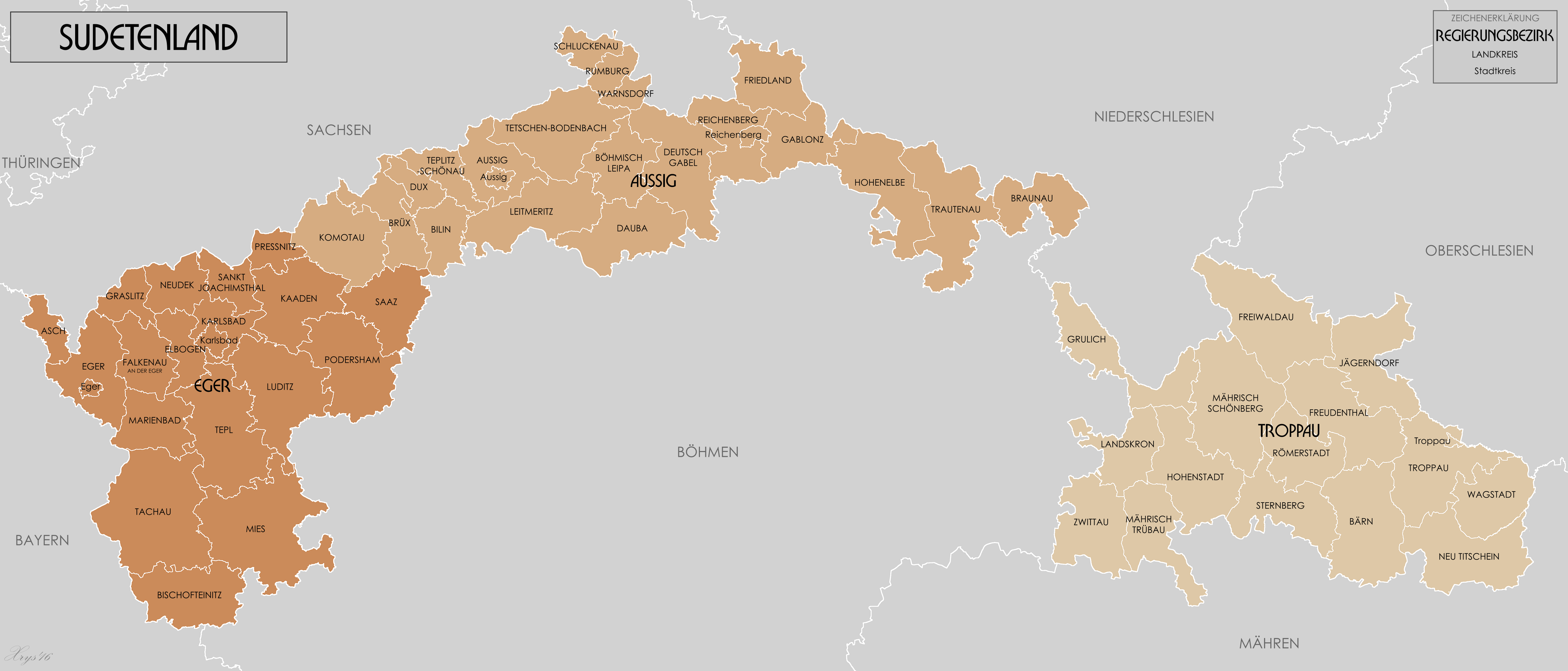 Verwaltungskarte von Reichsgau Sudetenland in Jahr 1944. Quelle GIS Data digitisierte aus Karte des Deutschen Reiches 1:100 000 und Karte von Mitteleuropa 1:300k. Etwa Karte Quellen bei WIG (